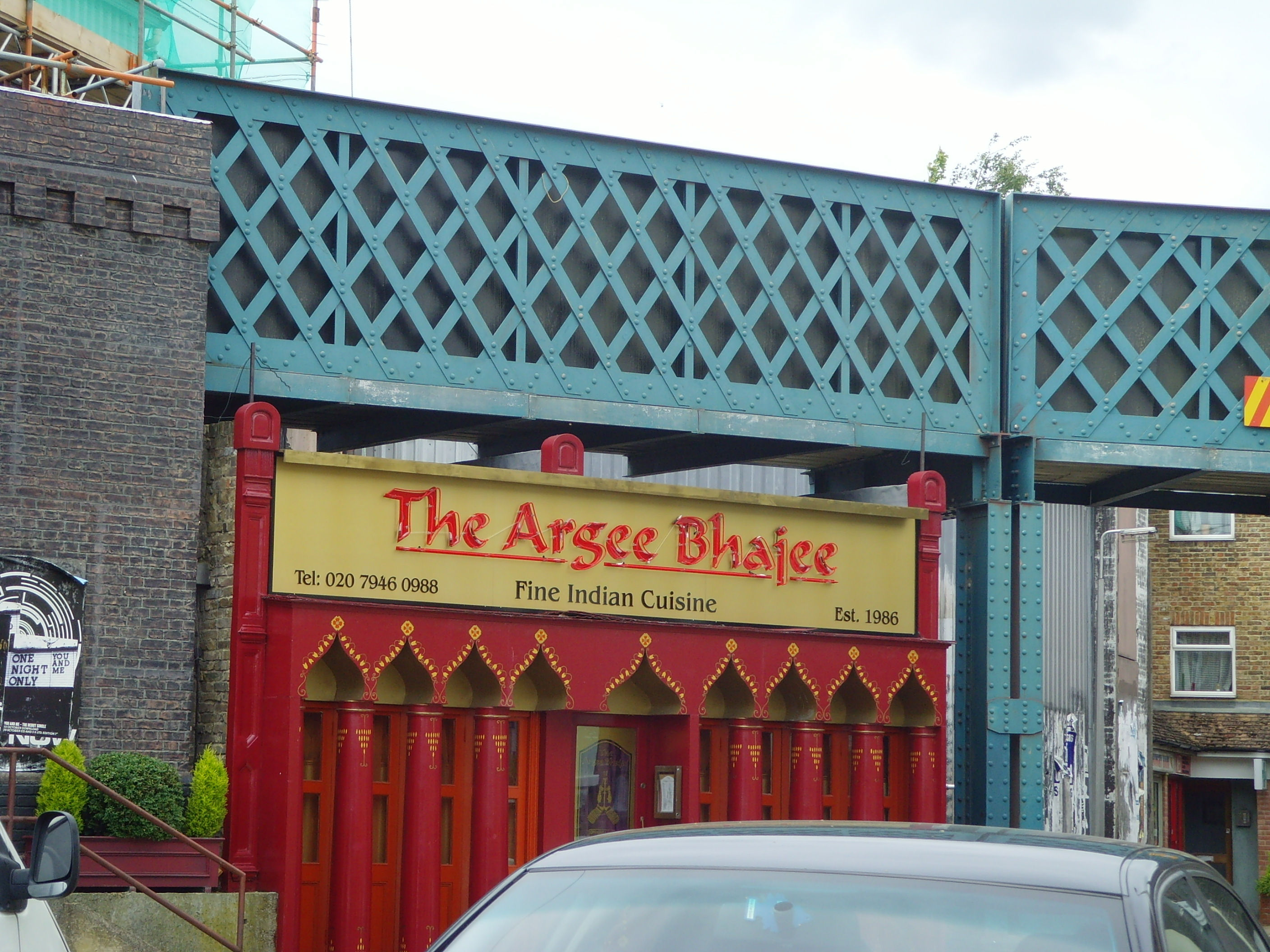 SNV31249.JPG